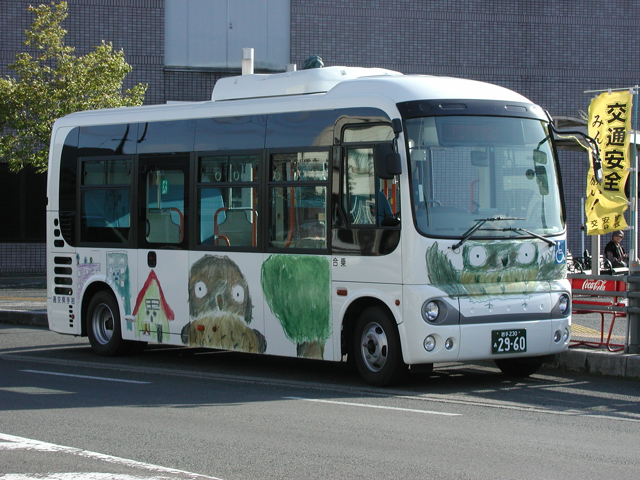 岩手県交通：花巻市内循環バス「ふくろう号」（日野・ポンチョショートボディ：BDG-HX6JHAE）